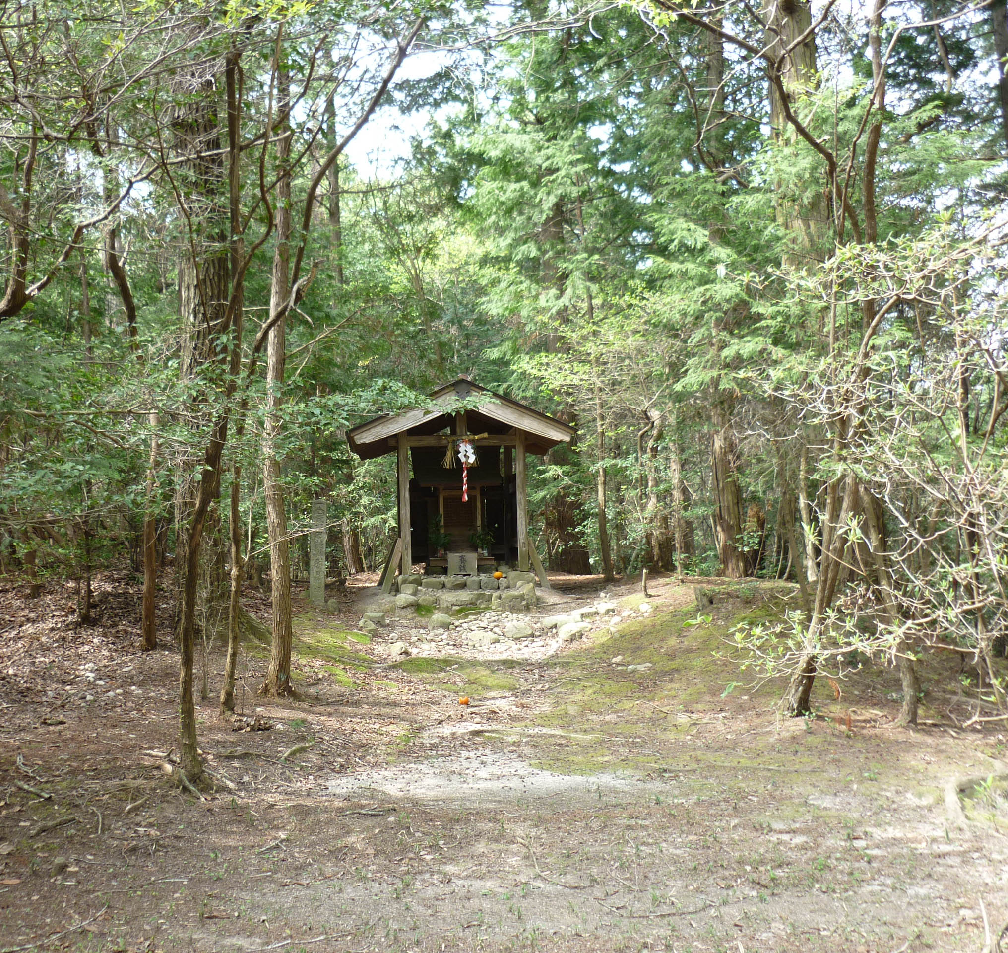 曲輪跡